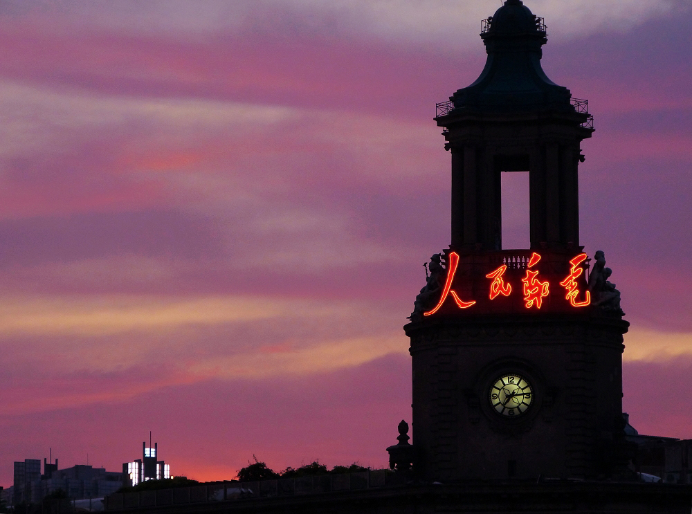 中文（中国大陆）: 工部局-书信馆(现上海邮政总局）